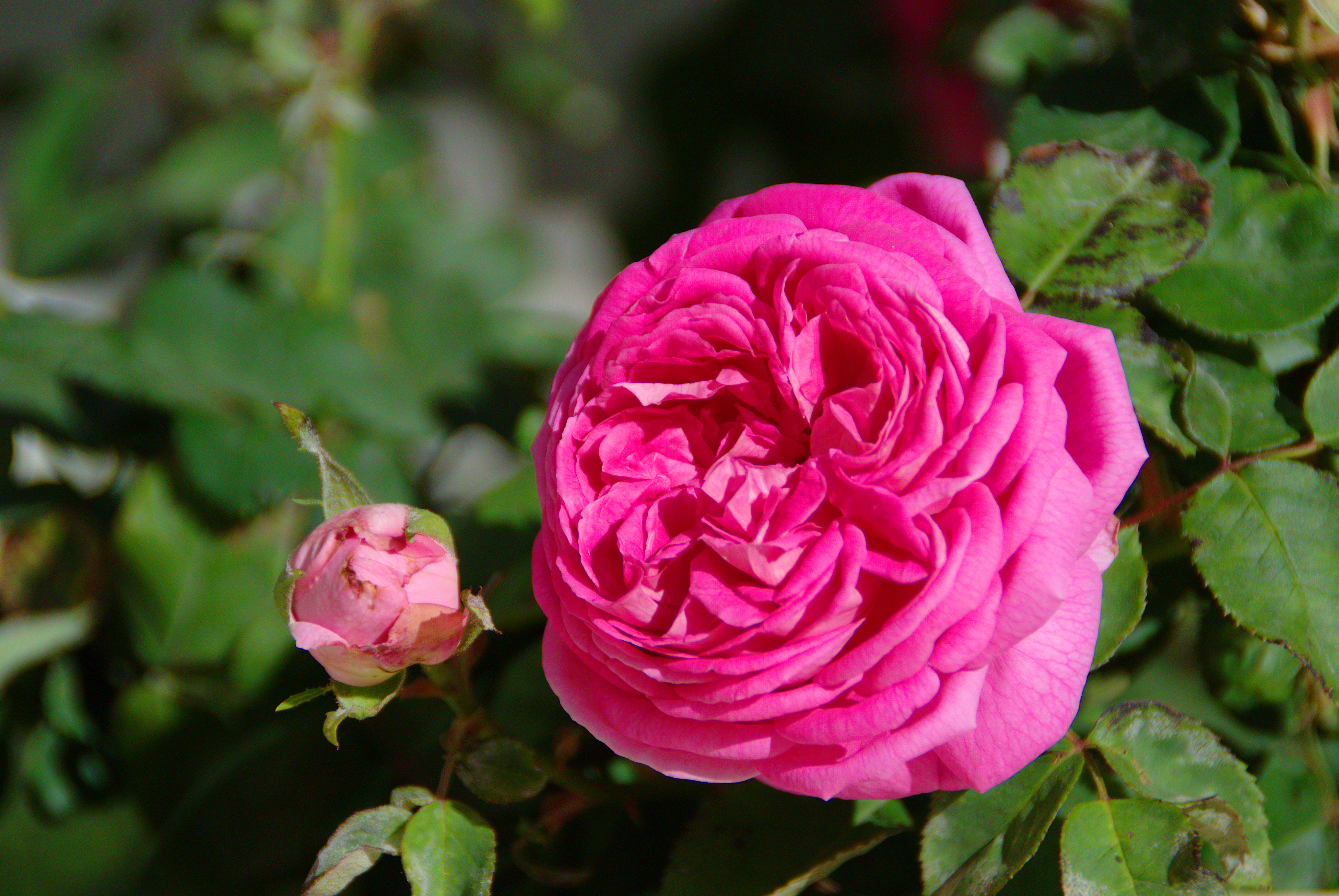 Rose de Sayada, Tunisie